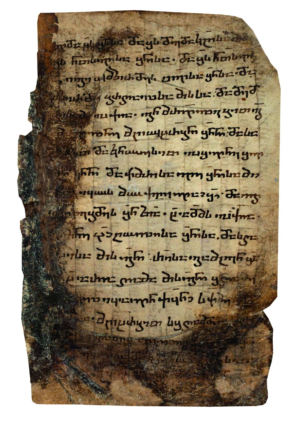 Triodion, 13th-14th cc. Georgian manuscript